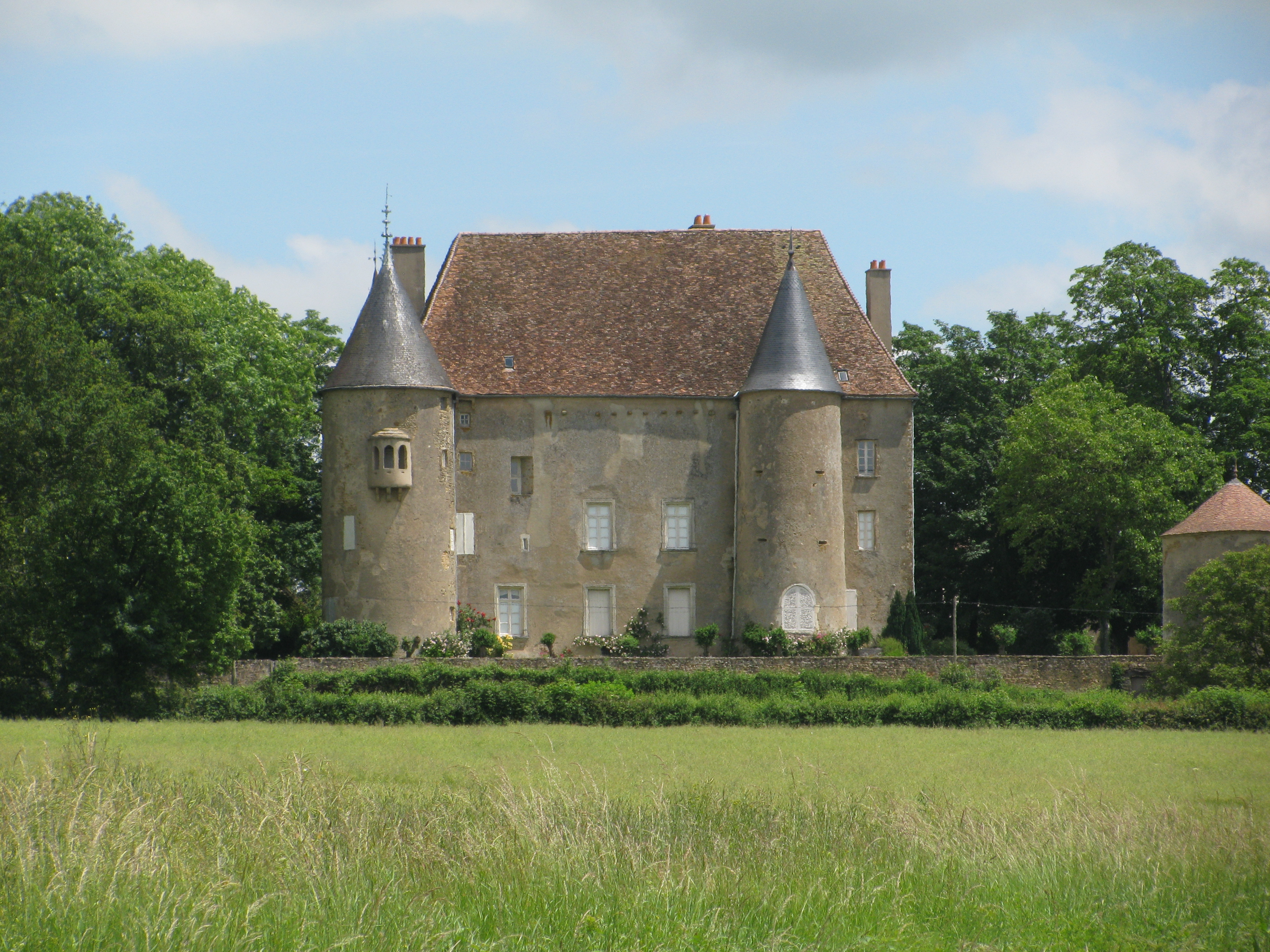 Le château de Domecy à Domecy-sur-Cure, Nièvre, France.